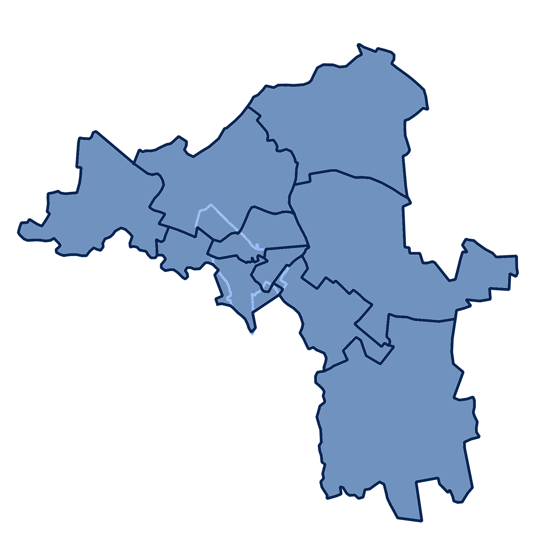 Mapa dekanatu kolskiego (diecezja włocławska) z podziałem na parafie.